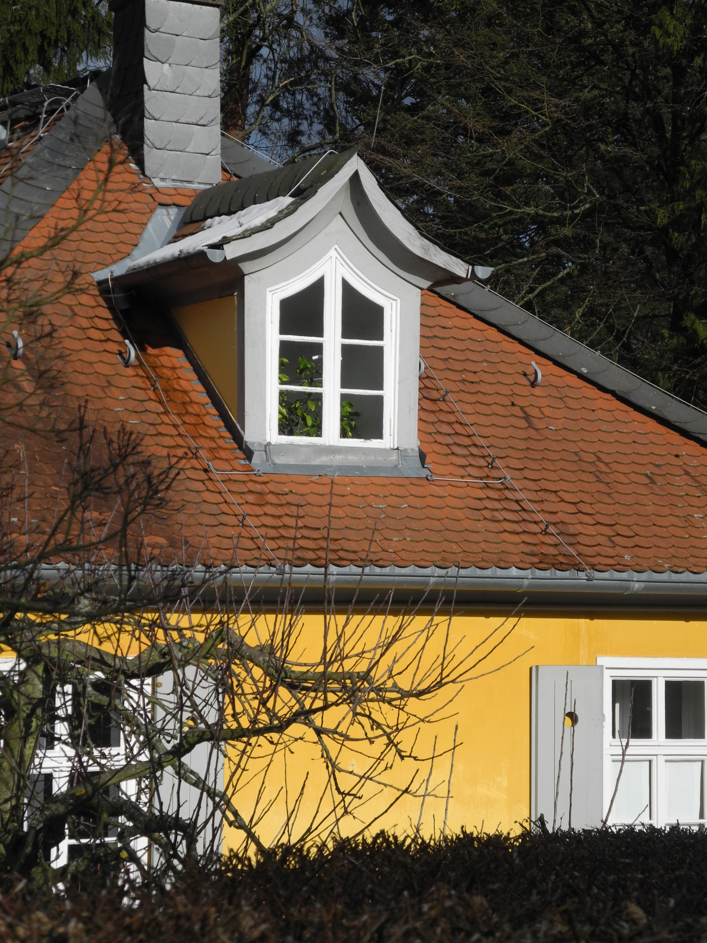 Die Bagatelle im Dorf Mulang ist ein Gebäude im Bergpark Wilhelmshöhe in Kassel, Hessen, Deutschland.Erbaut nach Plänen von Simon Louis du Ry und Johann Conrad Bromeis.Zunächst 1782 - 1785 in Holz, 1820 in Stein nachgebaut.